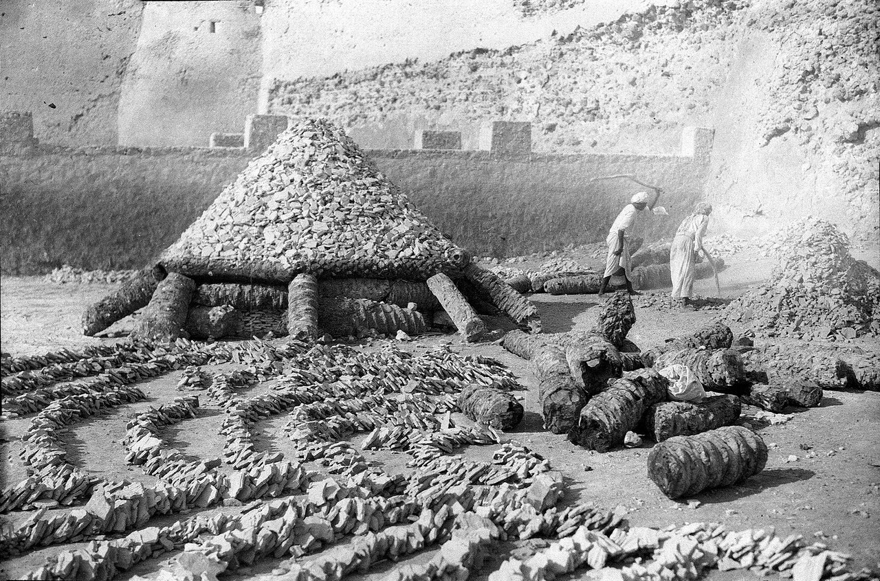 أكوام من الحجر الجيري المُعد للحرق لاستعماله في أعمال الجبس والدهان أمام القلعة. تاريخ الصورة التقديري هو 1924م.